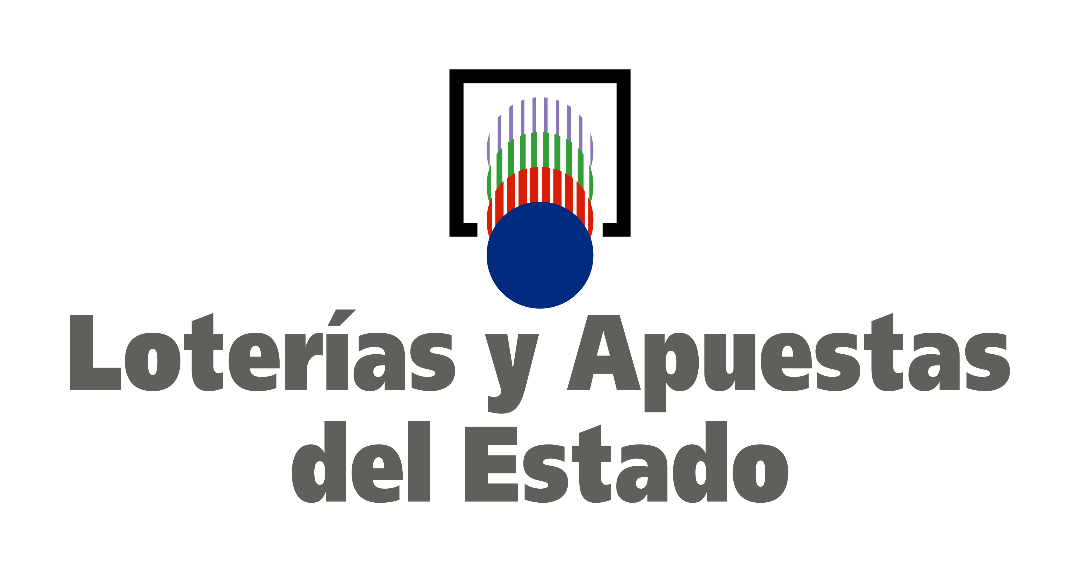 Logo de Loterías y Apuestas del Estado de España